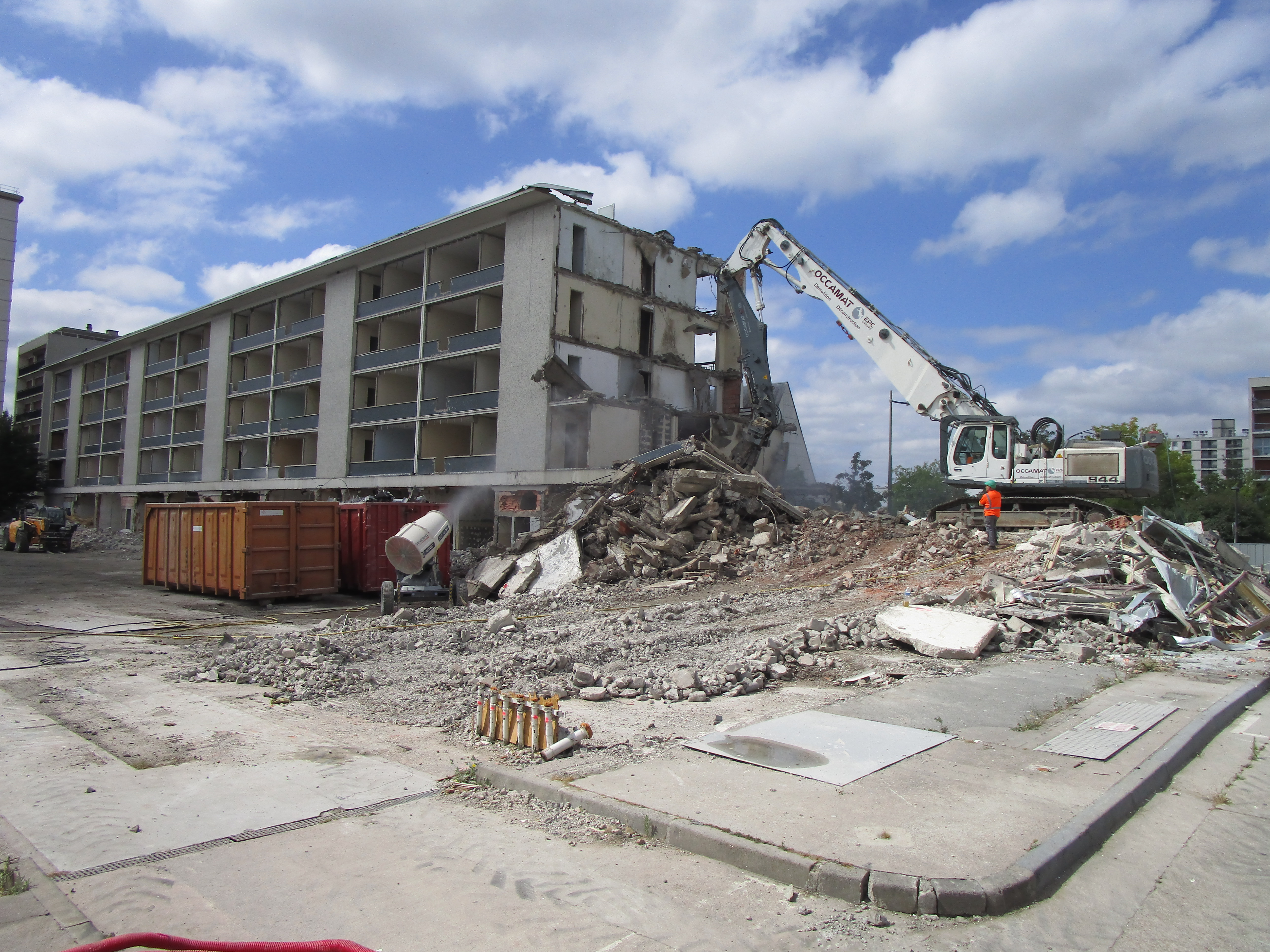 Destruction de la barre 17, place Saint-Paul dans le quartier du Sanitas, à Tours.